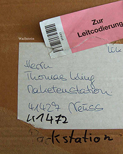 Zur Leitcodierung. Hg. von Kerstin Stüssel und Gabriele Wix.